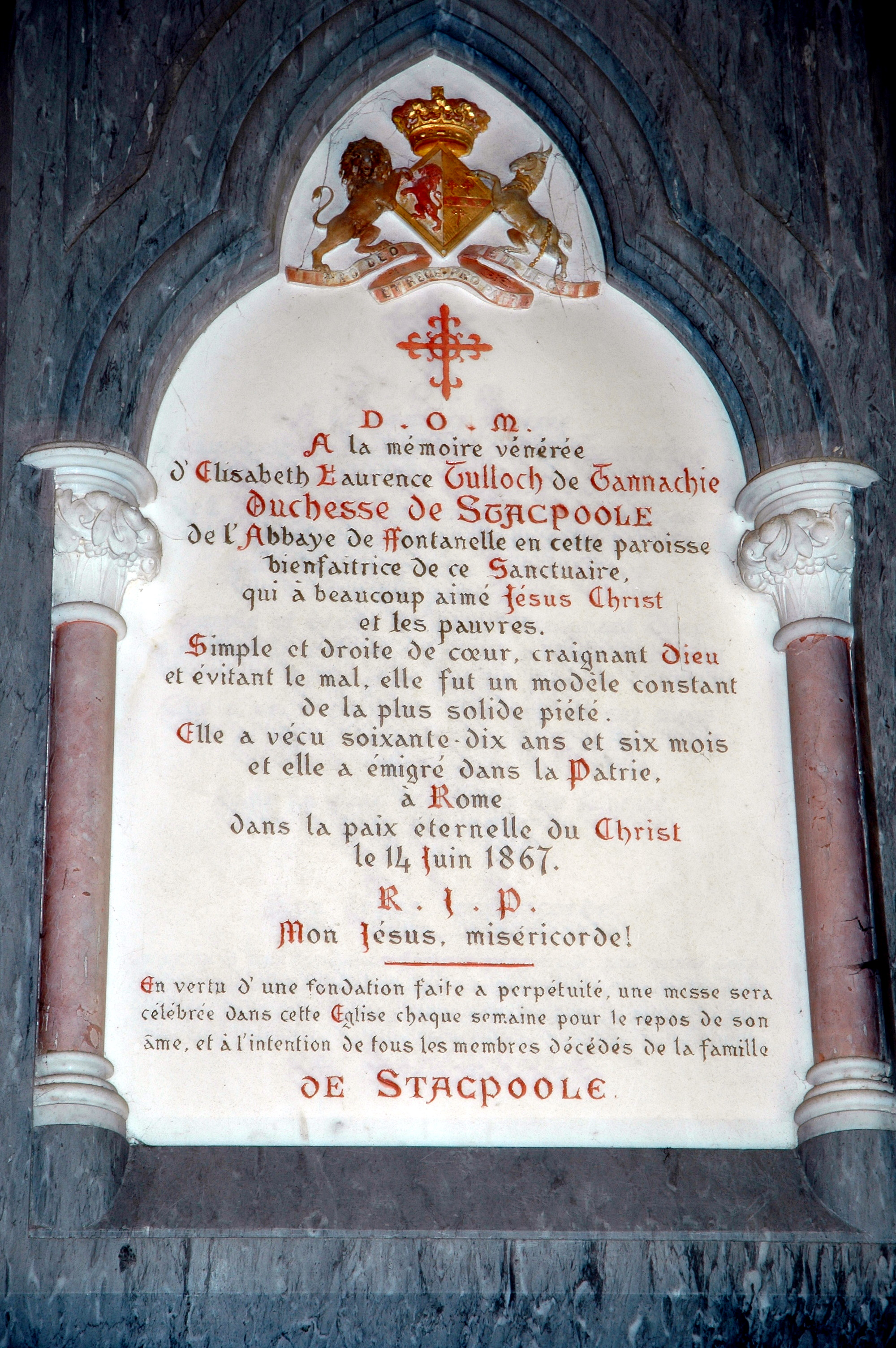 Saint-Wandrille-Rançon (Seine-Maritime, France) Église Saint-Michel.